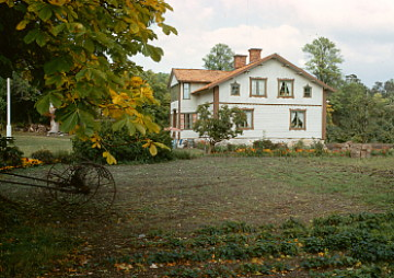 Östanviks gård, Nämdö socken, Värmdö Kommun.